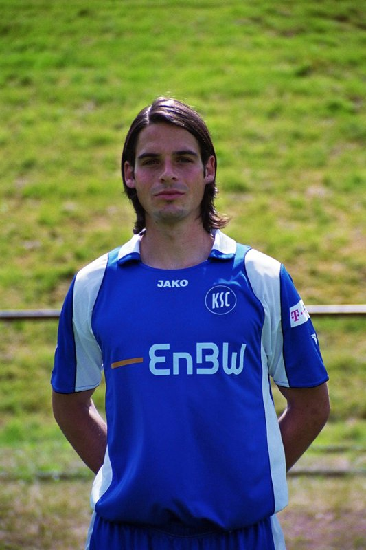 Stefan Buck